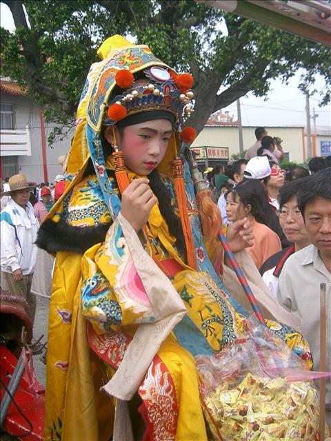 2007年學甲蜈蚣陣神童(宋仁宗)